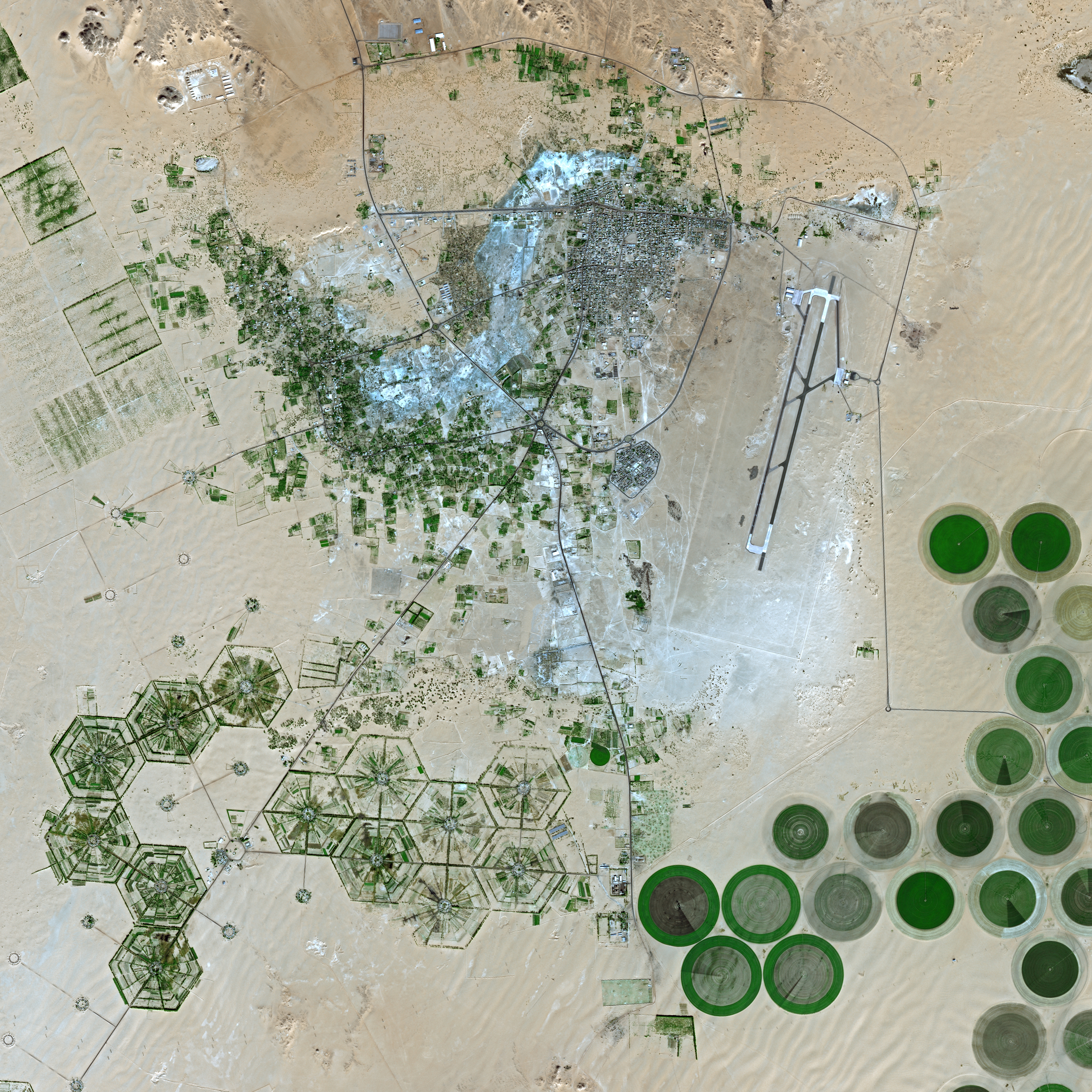 Kufra by SPOT satellite